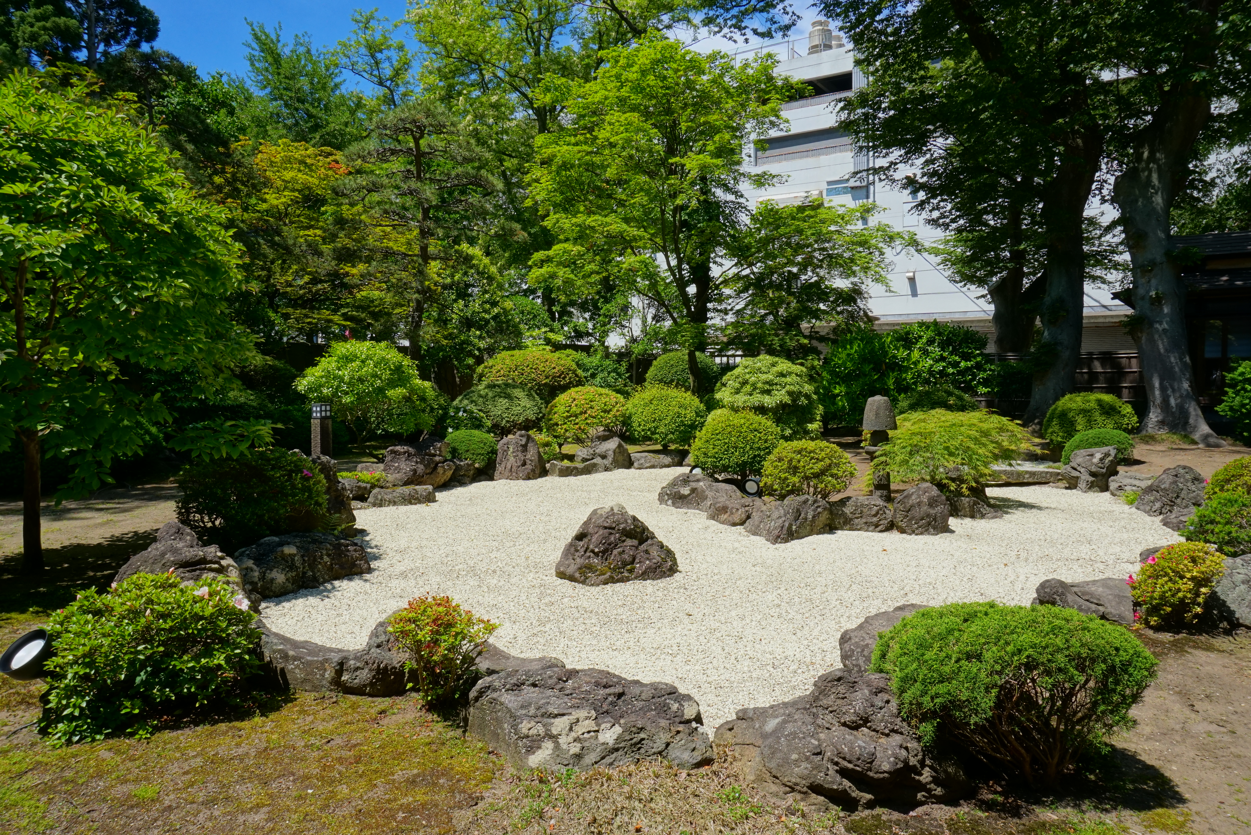 能代市観光交流施設、旧料亭金勇。秋田杉の天然材をふんだんに用いたかつての料亭で、2009年に料亭としては廃業し、施設が市に寄贈された。その後2013年に市の観光交流施設として再オープンしている。国の登録有形文化財に登録された豪奢な建物は、「東洋の木都」と称された工業都市、能代の往時の繁栄を伝える。